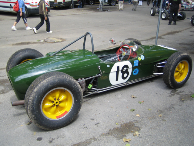 Lotus 18 F1 #372 Pau GP 2007